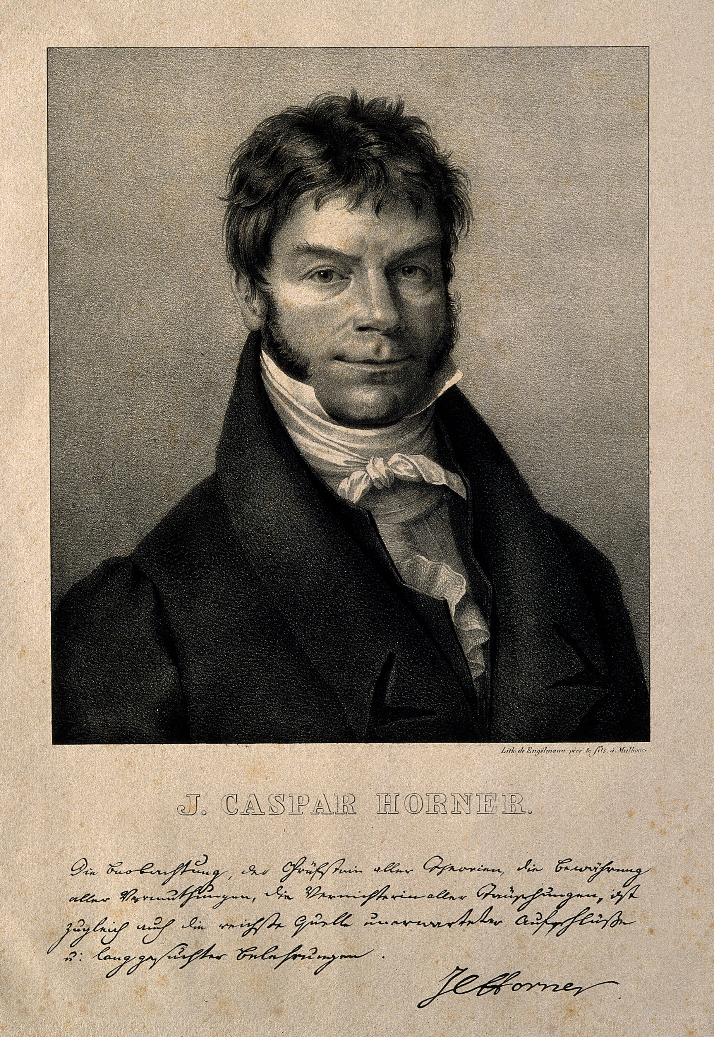 Genre/Technique: Portrait prints. Lithographs. Subject name: Horner, J., 1774-1834.